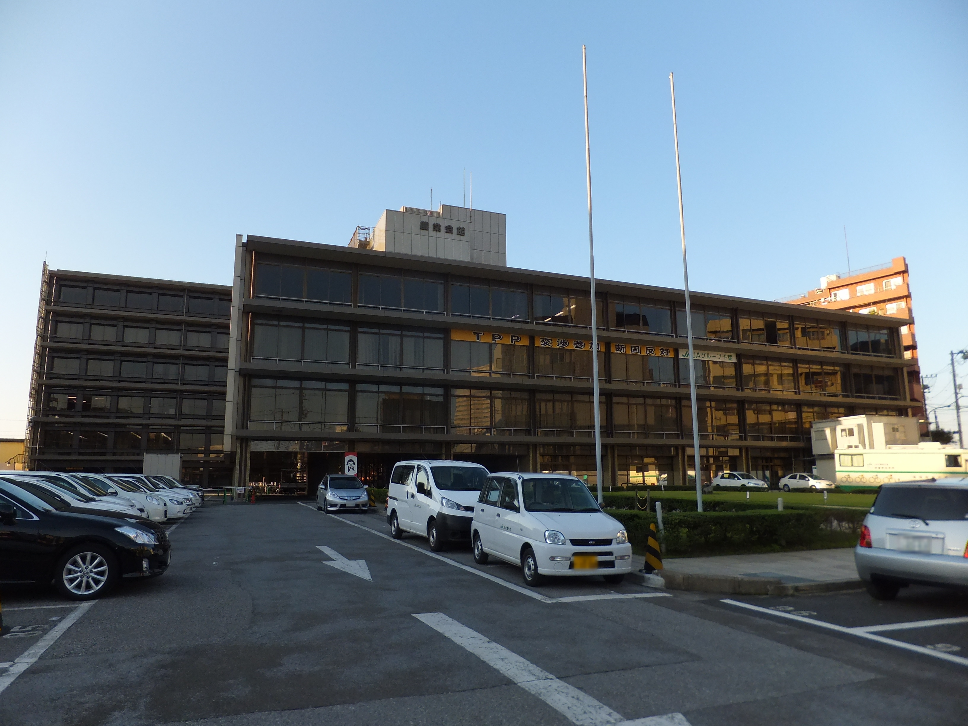 千葉県農業会館（千葉市中央区）